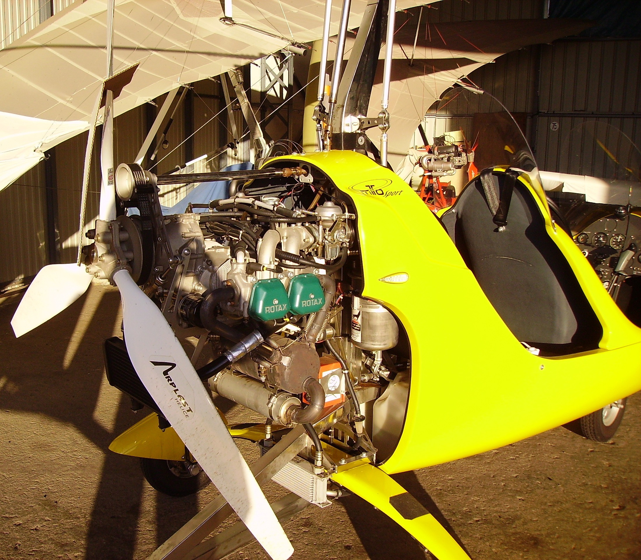 Autogire AutoGyro MTOsport. Consommation raisonnable : 10-12 L/h (balade en solo). L'inconvénient du moteur Rotax est son prix (élevé). Grandes pales en aluminium extrudé. Aérodrome de Cosne-sur-Loire, Nièvre, Bourgogne, France.